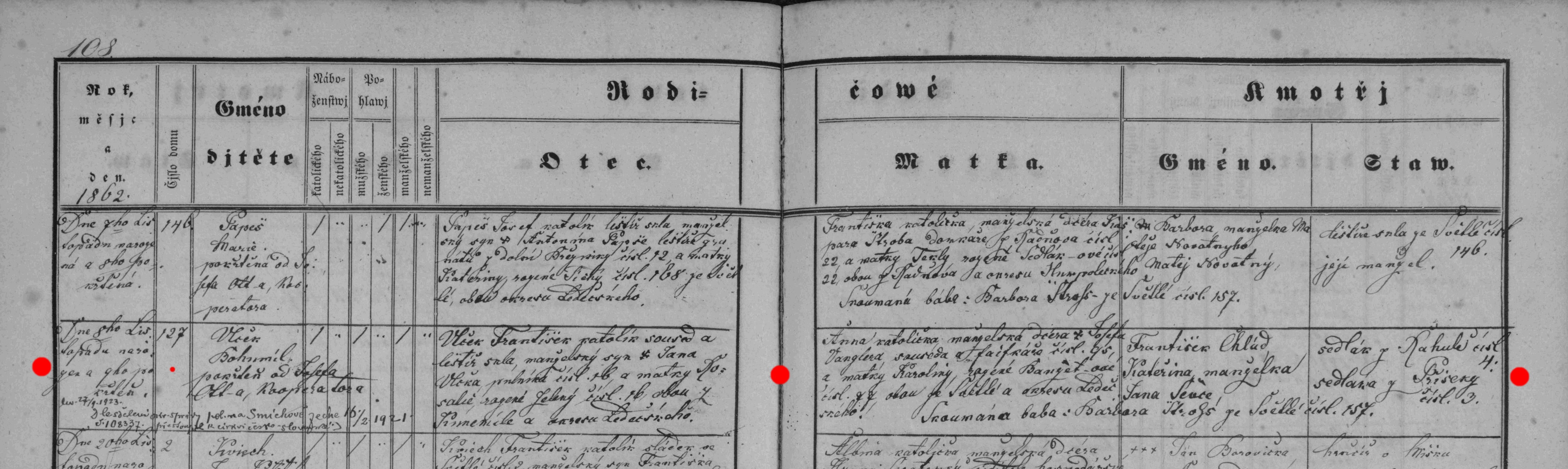 matriční zápis o narození a křtu Bohumila Vlčka (matrika N 1850-1870 Světlá nad Sázavou (SOA Zámrsk))